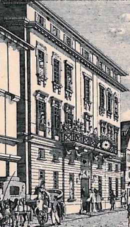 Heilbronn, Gasthaus zur Sonne. Lithographie (Ausschnitt)